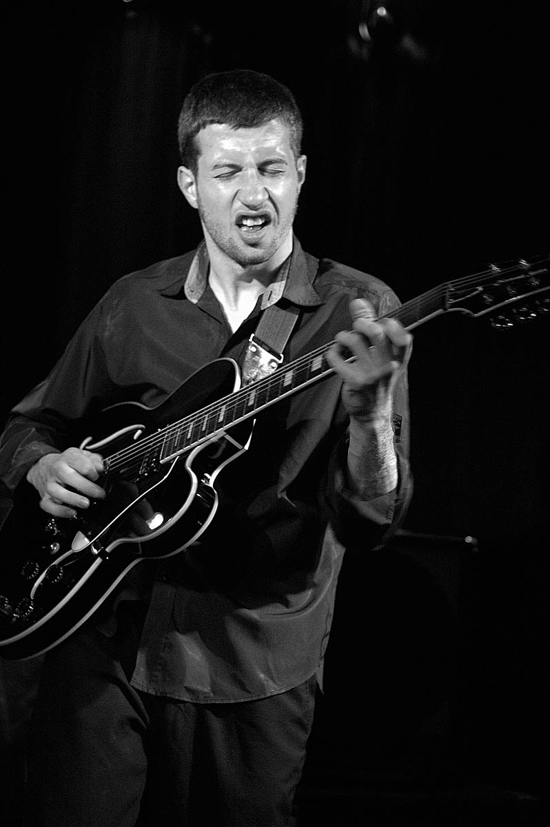 Ronny Graupe mit Hyperactive Kid (Philipp Gropper, Christian Lillinger) im A-Trane